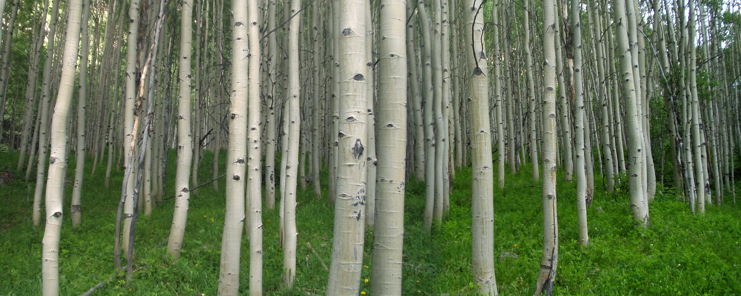 „Schöne Perspektive“ – Baumstämme (Populus spec., Pappel- oder Aspenhybriden).